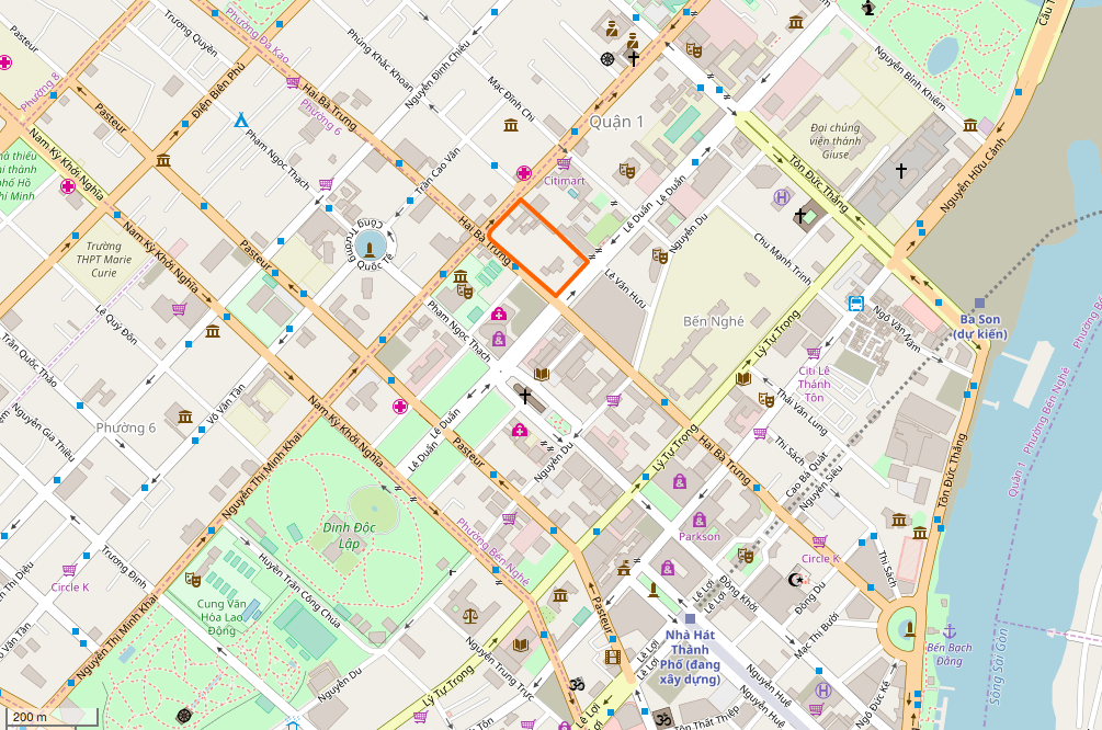 L'IF et l'Ambassade de France d'Ho Chi Minh sur OpenStreetMaps